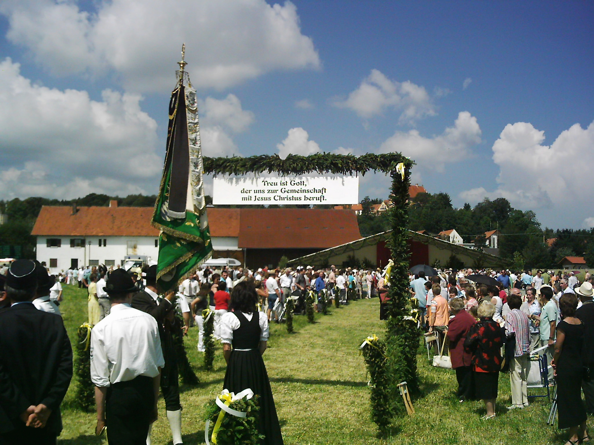 Primiz in Osterberg, Landkreis Neu-Ulm